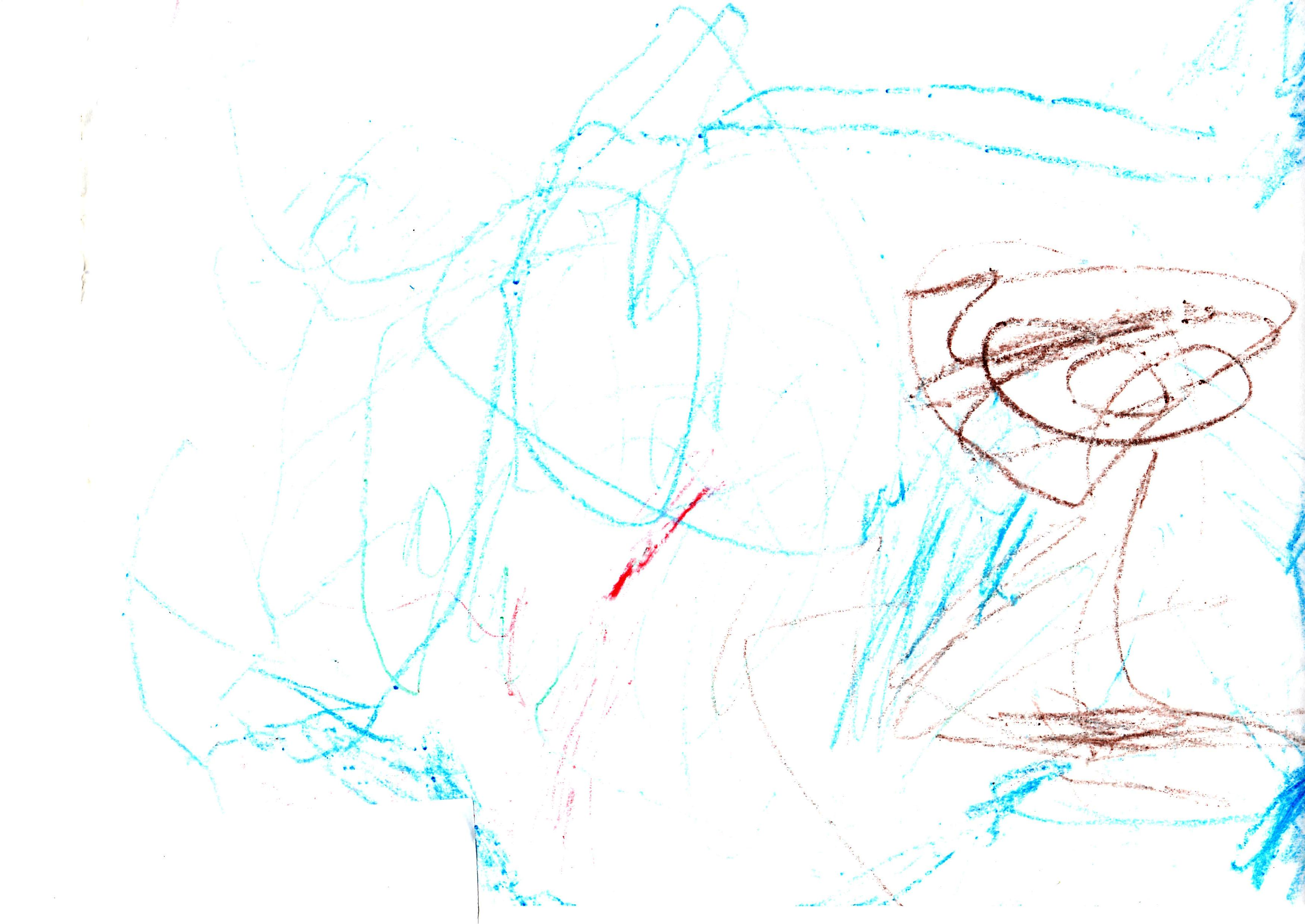 שלב השרבוט